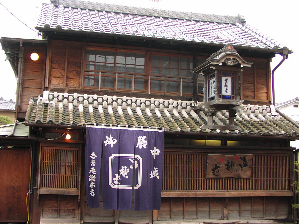 蔵造りの蕎麦屋